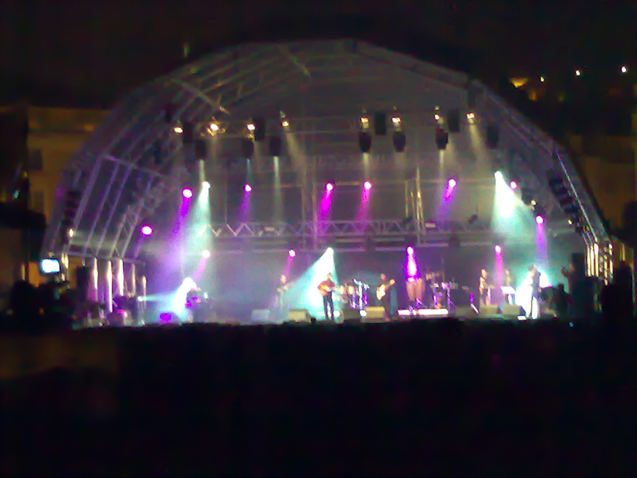 Concerto de Tito Paris na passagem de ano de 2008, no Terreiro do Paço, em Lisboa, em Portugal. A concert by Tito Paris, in Lisbon, Portugal, 2008 new year's eve.